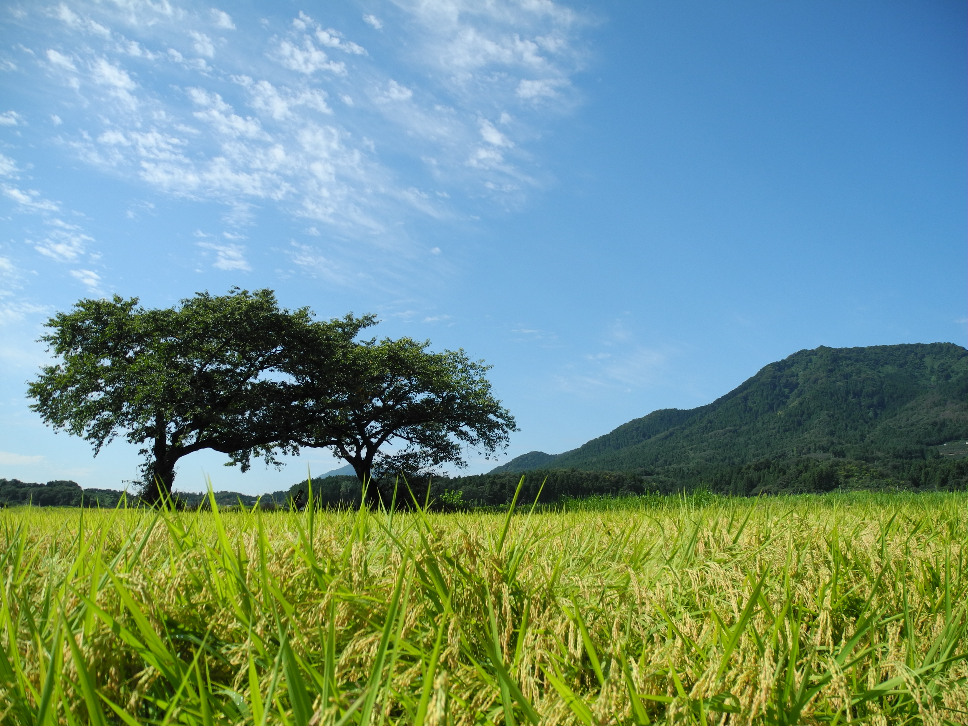 越後平野の田園風景 新潟市西蒲区 2014年9月7日撮影